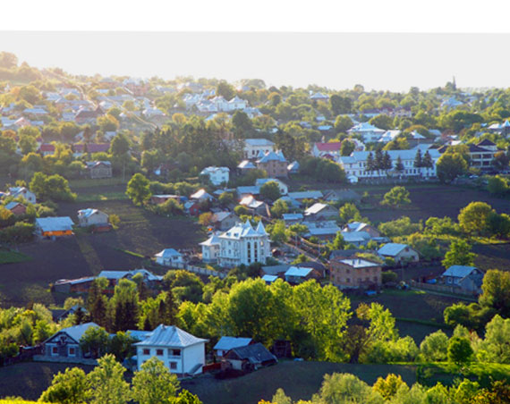 село Волока Глибоцький рн.